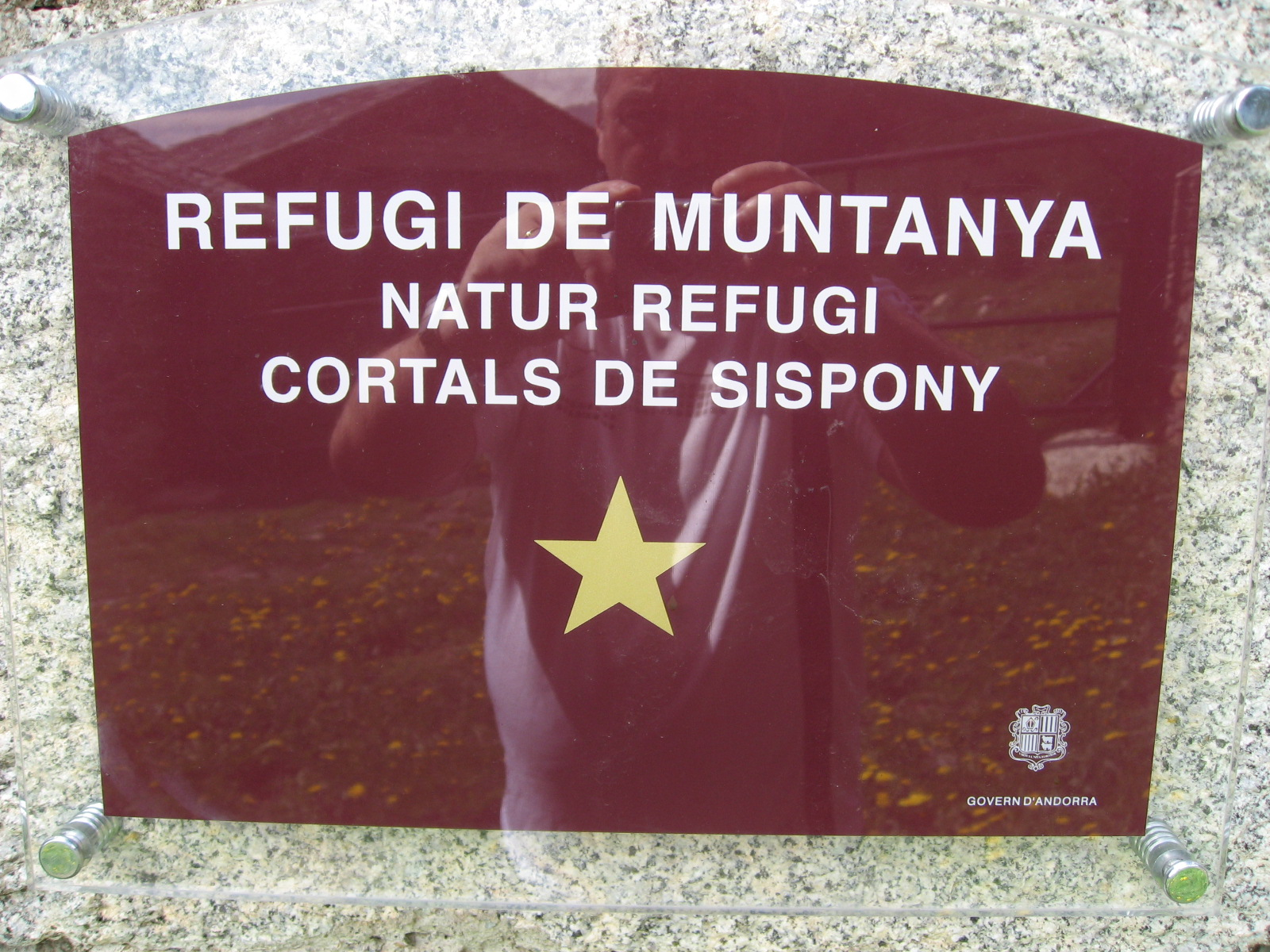 refuges Andorre